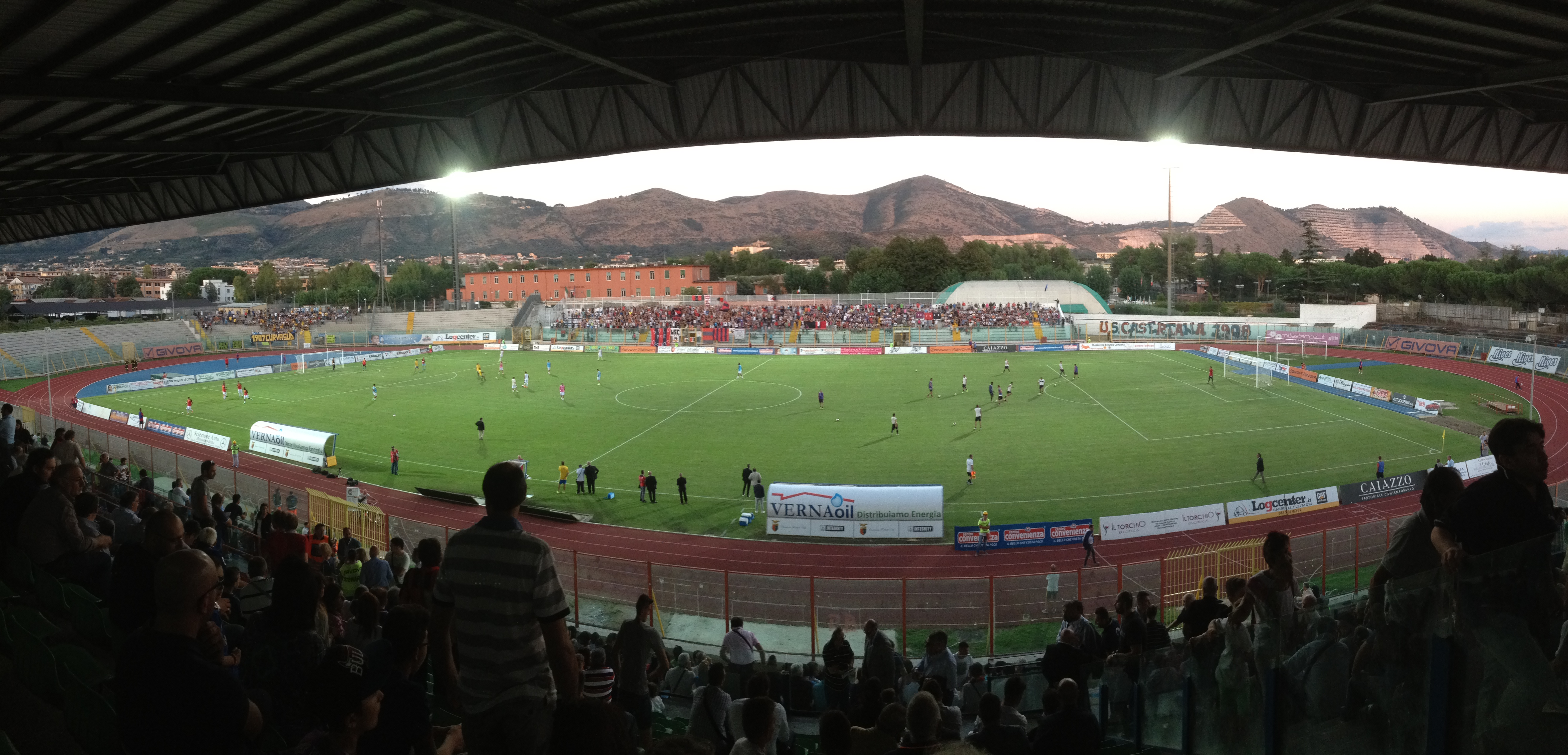 Panoramica dello stadio A. Pinto in occasione della partita di campionato di Serie C tra Casertana e Juve Stabia